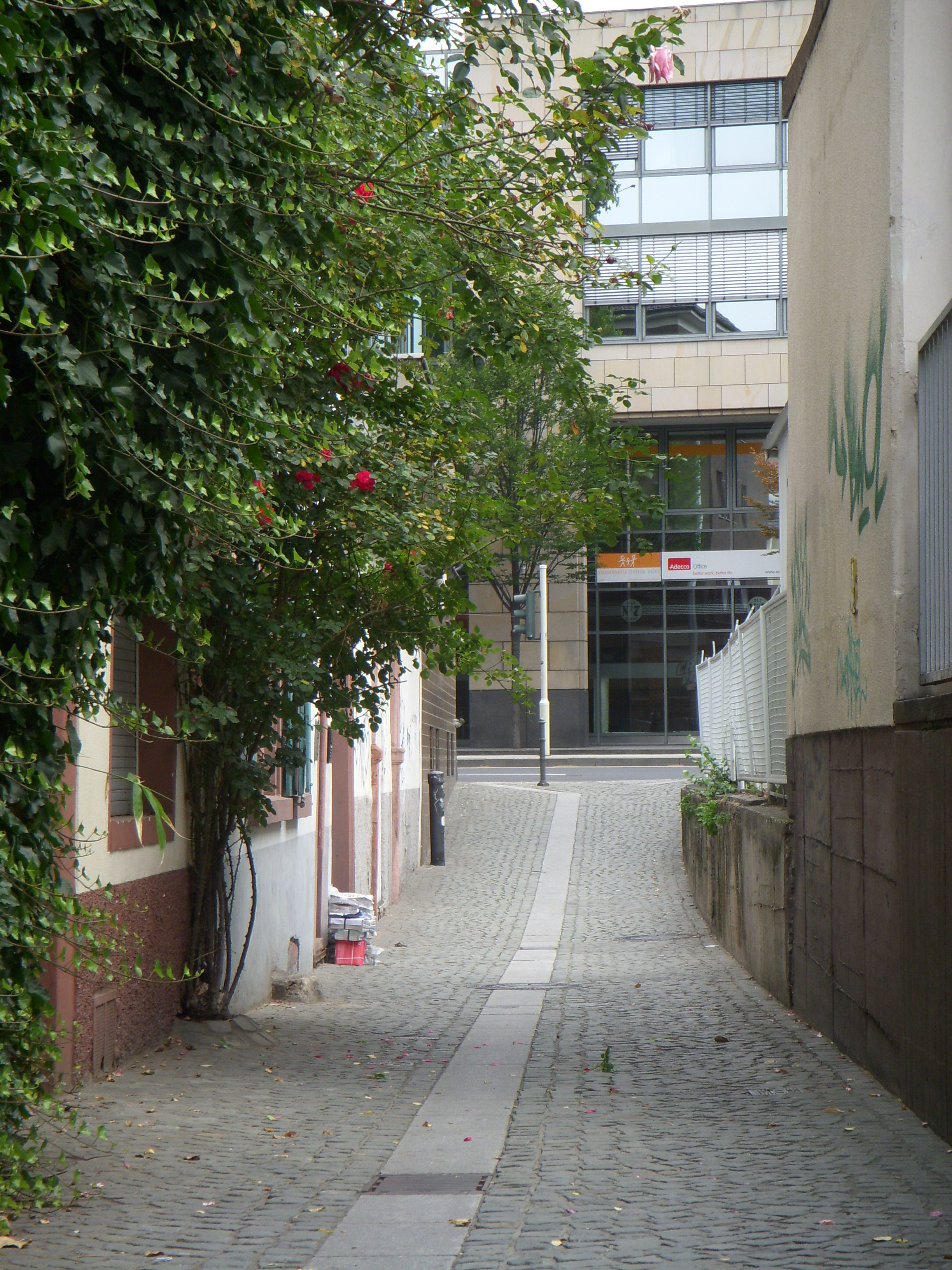 Tieferes Straßenniveau